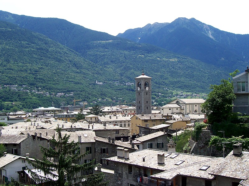 Sondrio